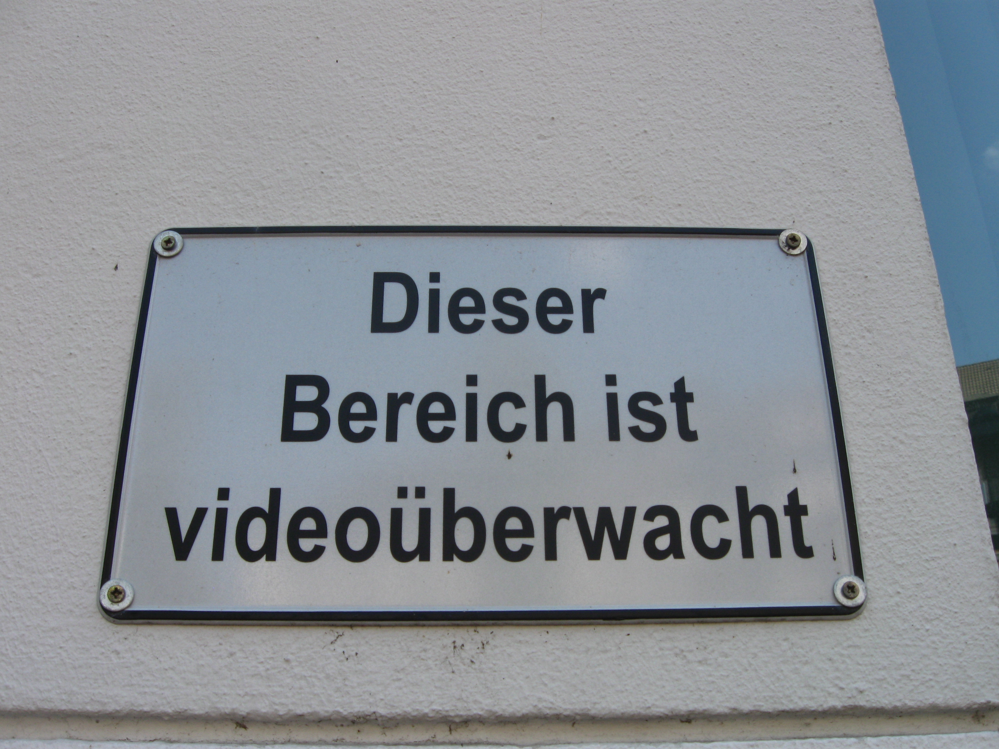 Hinweisschild an der Fassade der alten Post (heute Amtsgericht) am Grendplatz 4 in Essen-Steele.